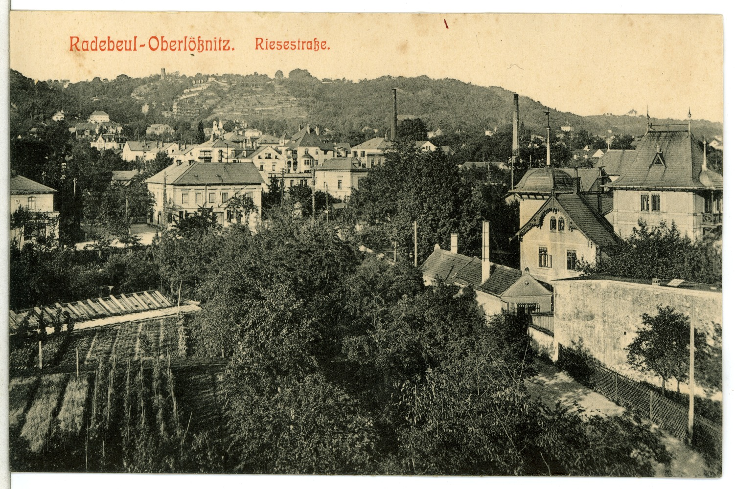 Radebeul; Oberlößnitz, Riesestraße This postcard is from publisher Brück & Sohn in Meißen ( postcard has a unique number 12698 and is available in a higher resolution at the publisher. This images was uploaded in a cooperation project between Wikipedians and the publisher.